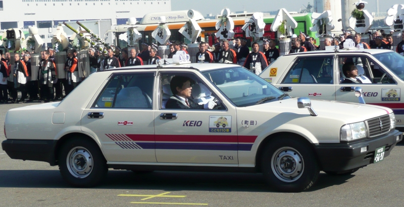 京王自動車のセドリック。東京消防出初式にて撮影。